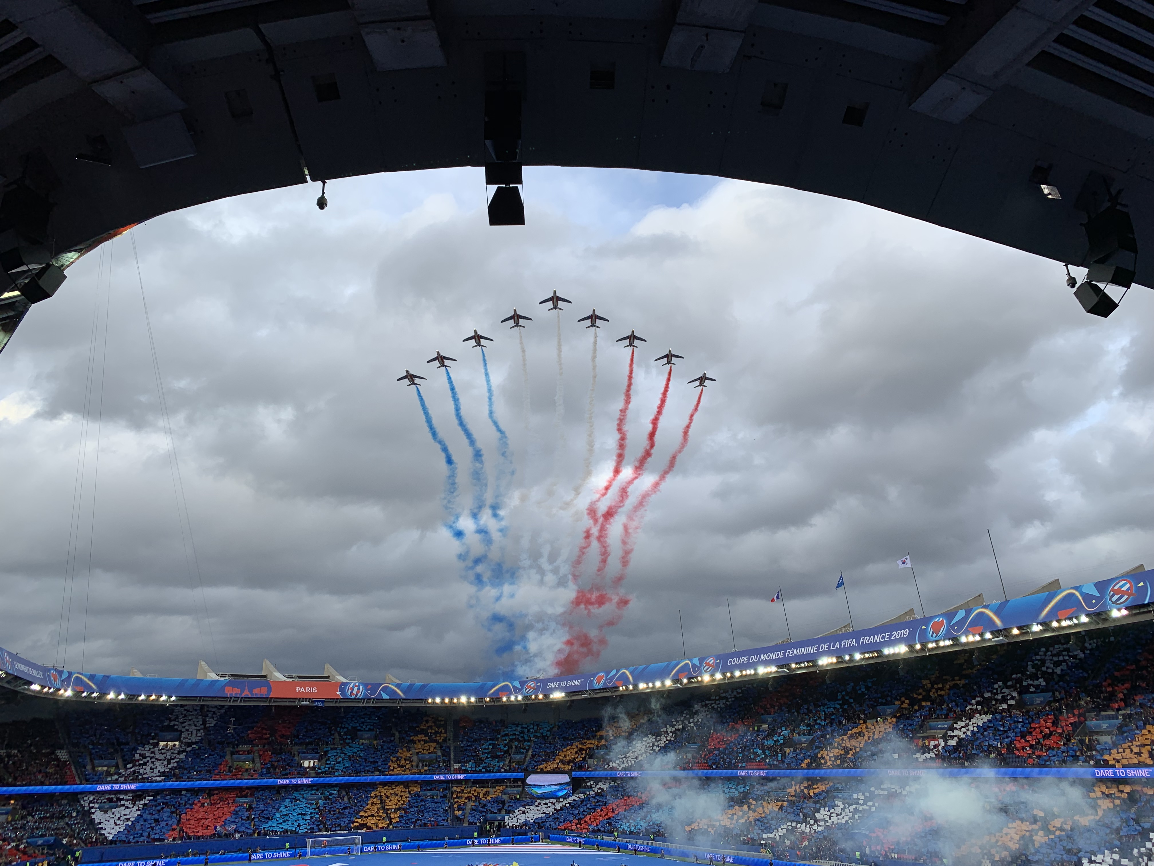 Match d'ouverture de la coupe du monde féminine de football : France vs Corée du Sud le 7 juin 2019 au Parc des Princes à Paris. Survol de la patrouille de France au-dessus de France.